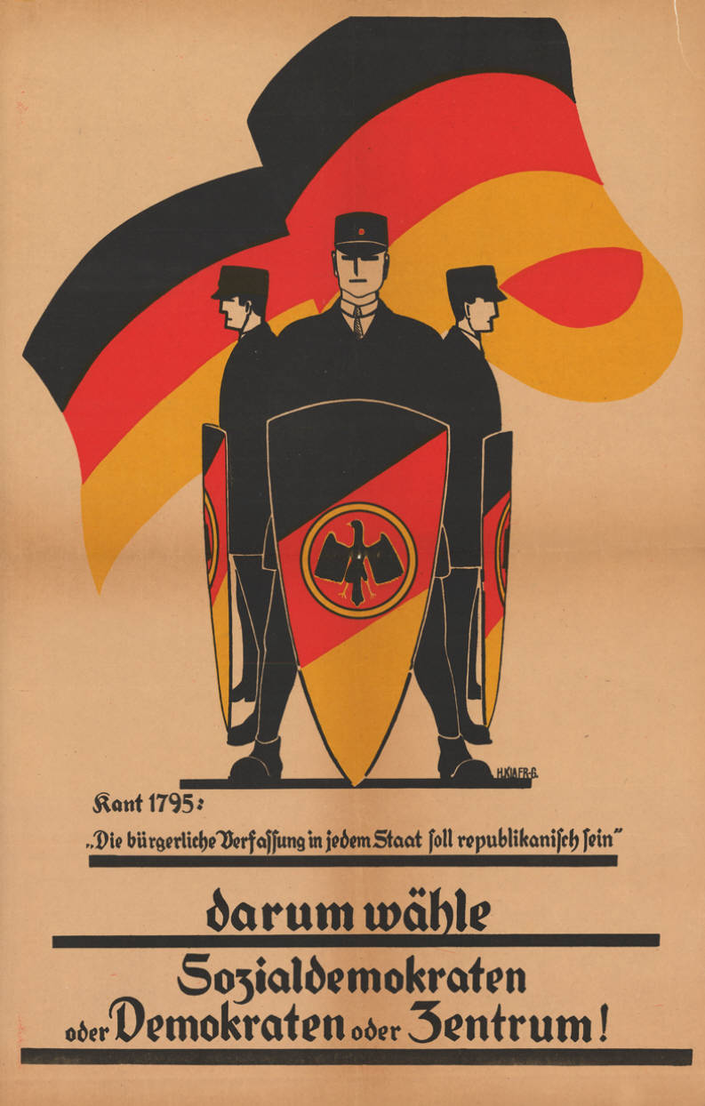 Kant 1795: "Die bürgerliche Verfassung in jedem Staat soll republikanisch sein." darum wähle Sozialdemokraten oder Demokraten oder Zentrum! Abbildung: Schwarz-rot-goldene Fahne, davor "Soldaten" mit gleichfarbigen Schutzschildern mit Adlermotiv Kommentar: Reichstagswahl 1924 Plakatart: Motiv-/Textplakat Künstler_Grafiker: H. Klaer-G. Drucker_Druckart_Druckort: Offsetdruck Hermann Baswitz, Berlin Objekt-Signatur: 10-043 : 9 Bestand: Plakatsammlung Weimarer Republik/NS-Zeit (10-043) GliederungBestand10-18: Zentrum Lizenz: KAS/ACDP 10-043 : 9 CC-BY-SA 3.0 DE